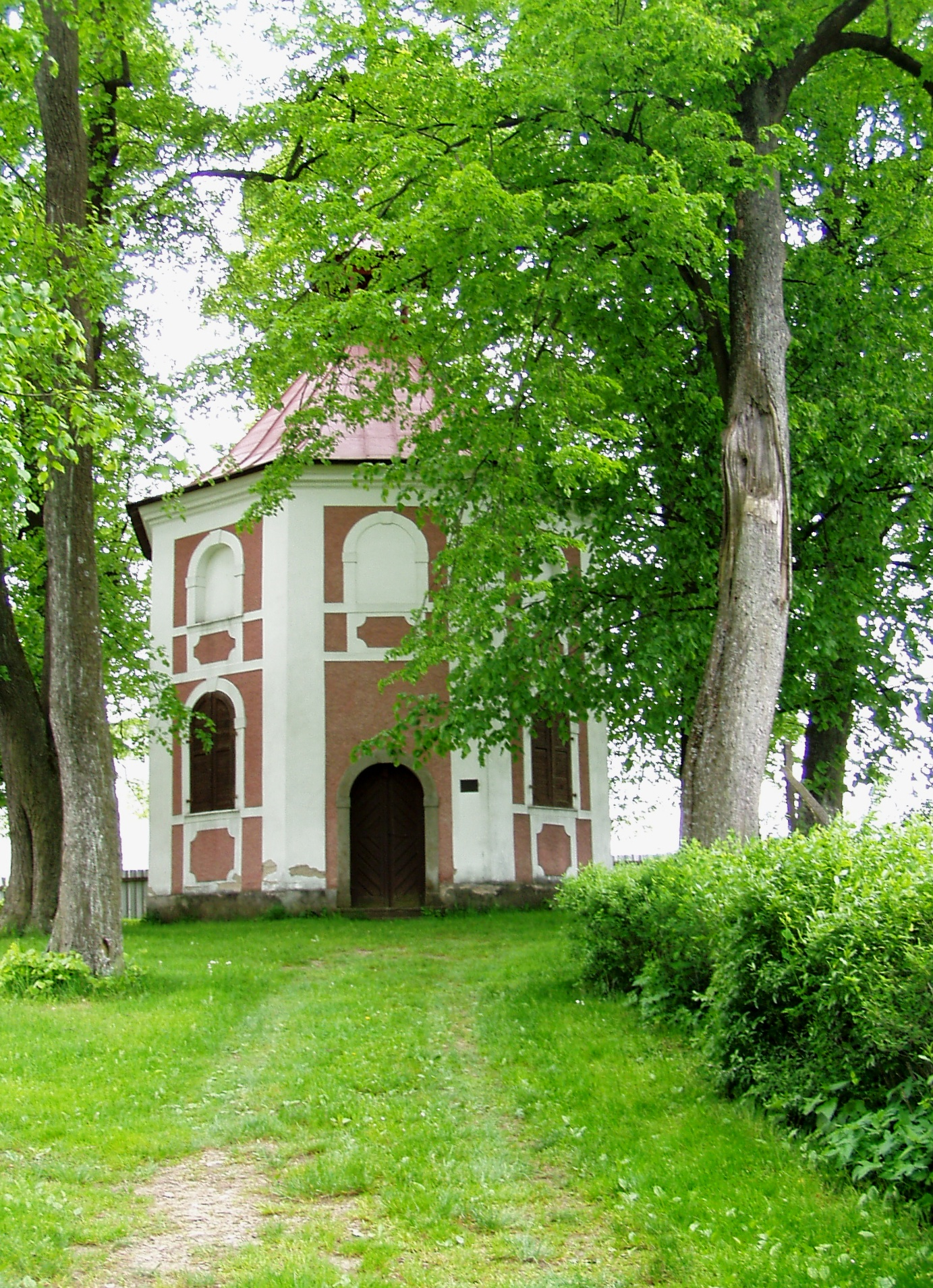 Kaple svaté Anny, sídliště 1. máje, severovýchodně od zámeckého areálu, st. 212, Rokytnice v Orlických horách.